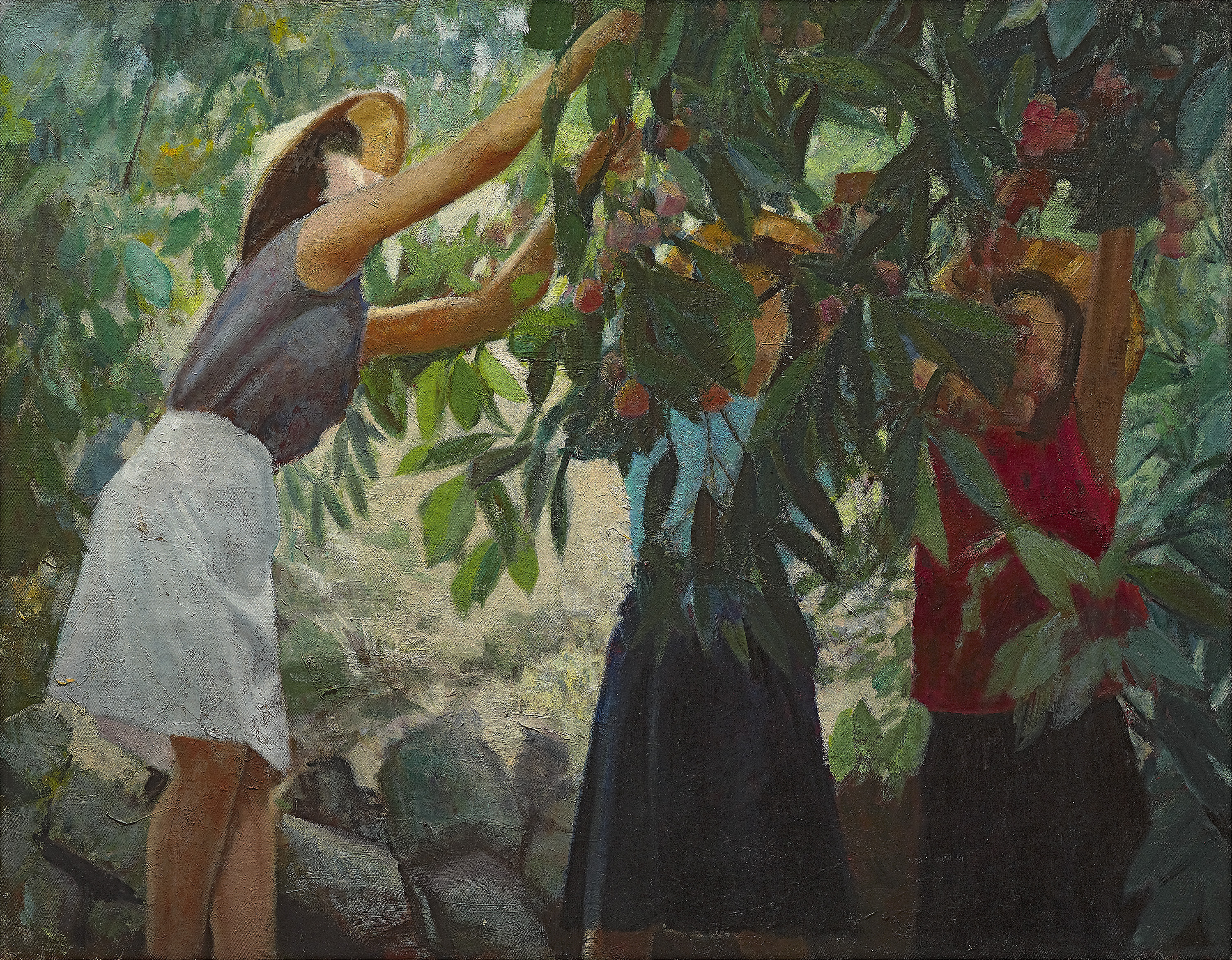 李梅樹 1969 【摘蓮霧-1】 油彩，畫布 91 x 116.5 cm